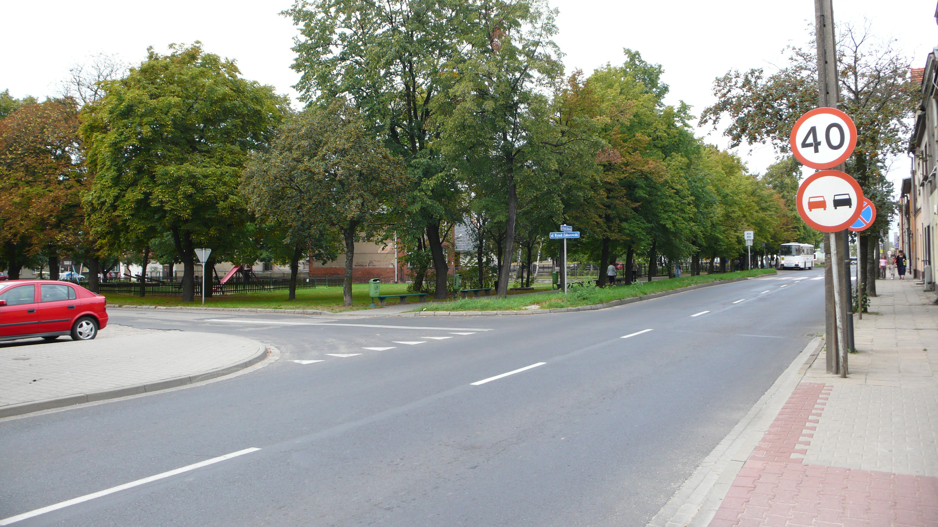 Rynek Zaborowski w Lesznie. Widok od strony południowej. Na pierwszym planie ul. Górowska.